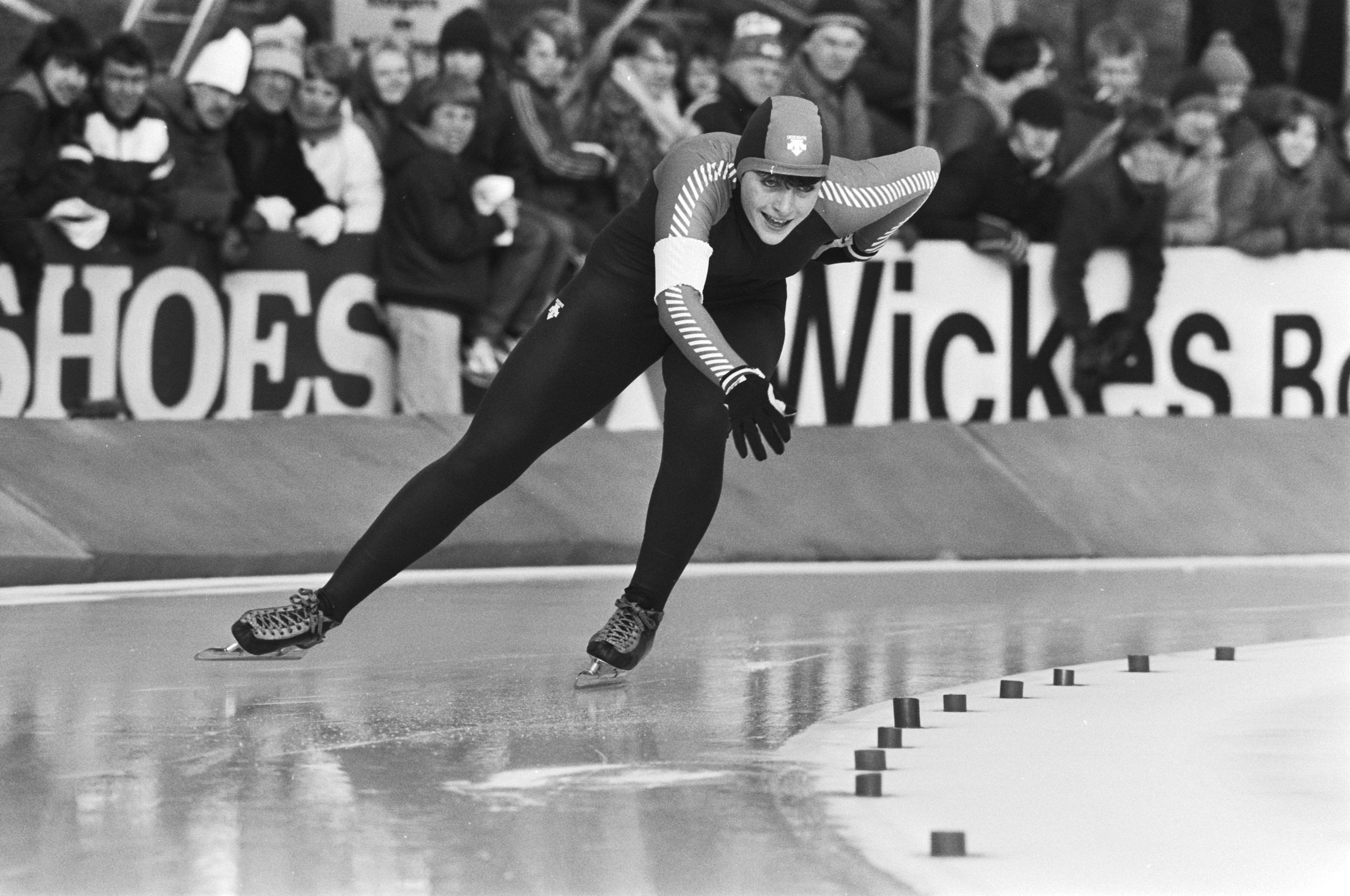 Collectie / Archief : Fotocollectie Anefo Reportage / Serie : [ onbekend ] Beschrijving : WK Sprint schaatsen in Alkmaar. Yvonne van Gennip in aktie Datum : 6 februari 1982 Locatie : Alkmaar, Noord-Holland Trefwoorden : schaatsen Persoonsnaam : Gennip, Yvonne van Fotograaf : Bogaerts, Rob / Anefo Auteursrechthebbende : Nationaal Archief Materiaalsoort : Negatief (zwart/wit) Nummer archiefinventaris : bekijk toegang 2.24.01.05 Bestanddeelnummer : 931-9574